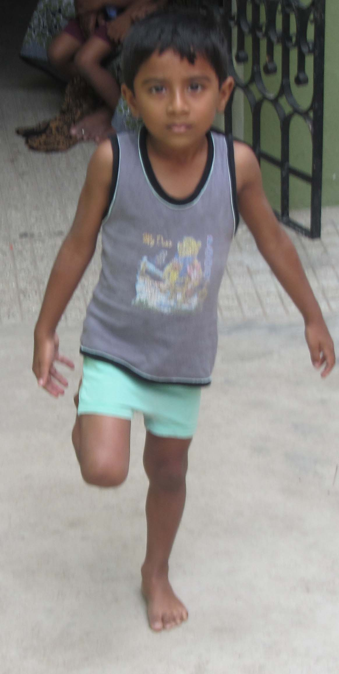 கோழிக்கால் விளையாட்டில் நீண்ட நேரம் நொண்டி அடித்தல் - own shot